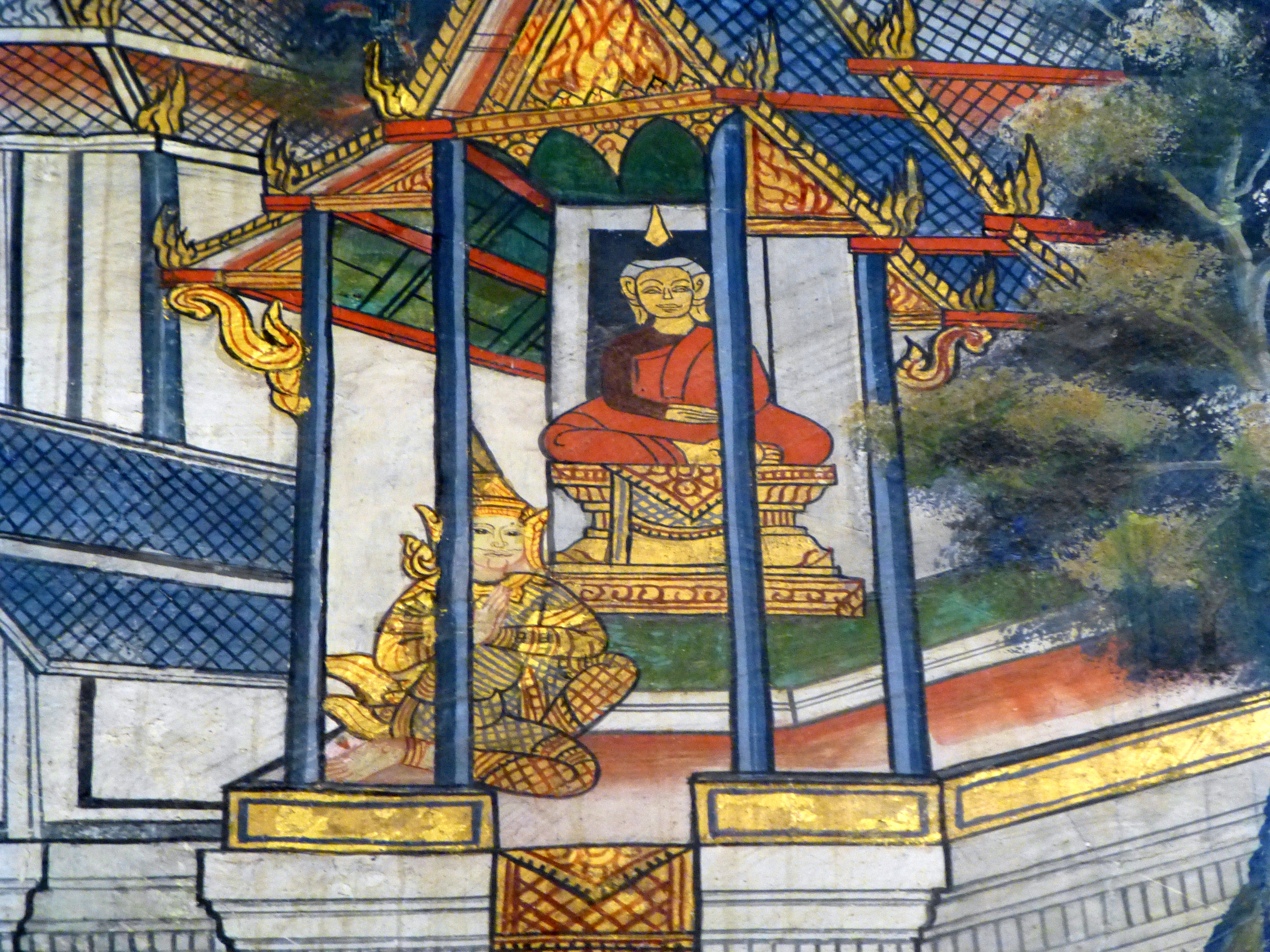 096 Mahapajapati, Wat Kasattrathirat, Ayutthaya